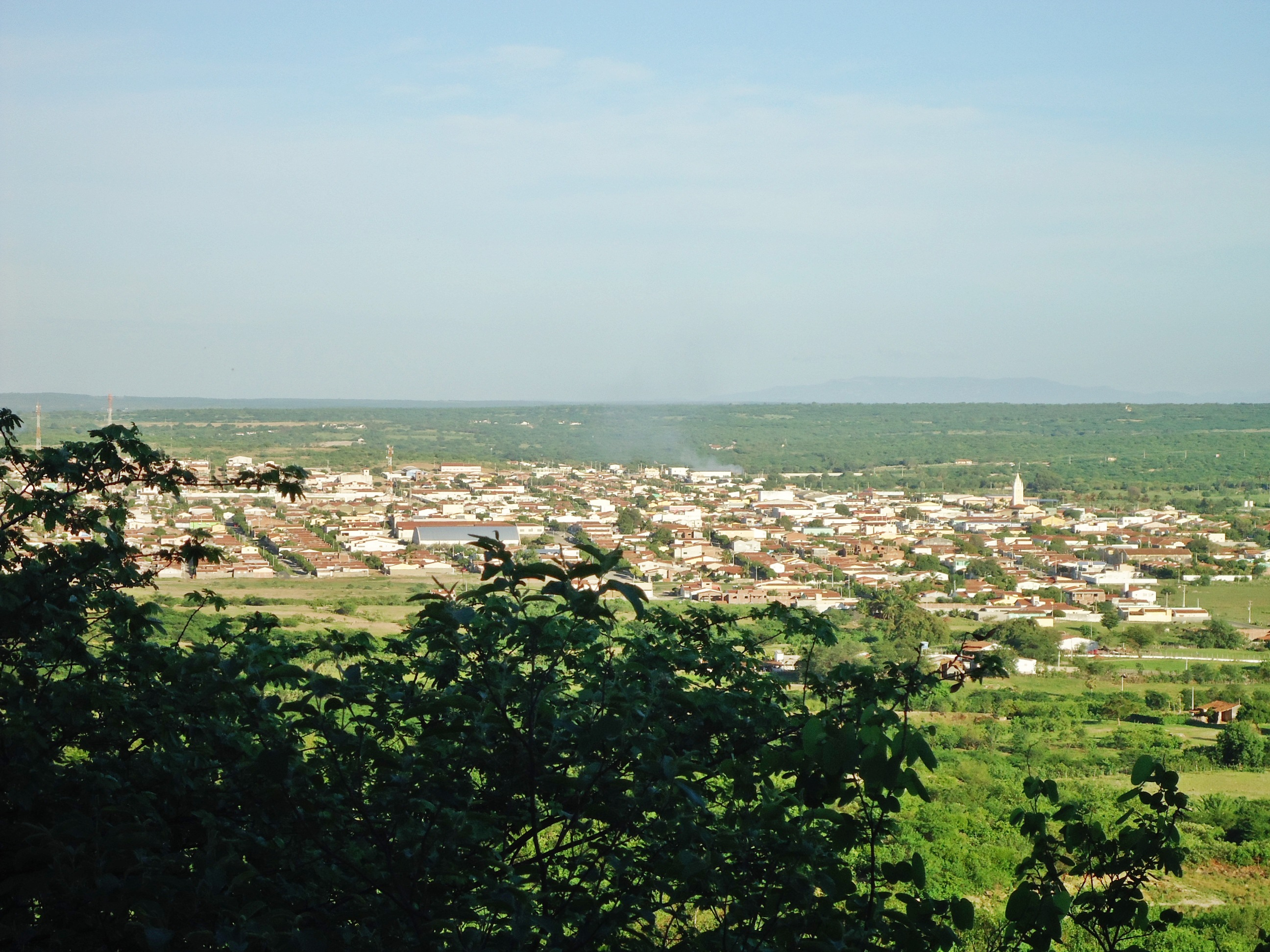 Parelhas vista da Serra do Boqueirão.